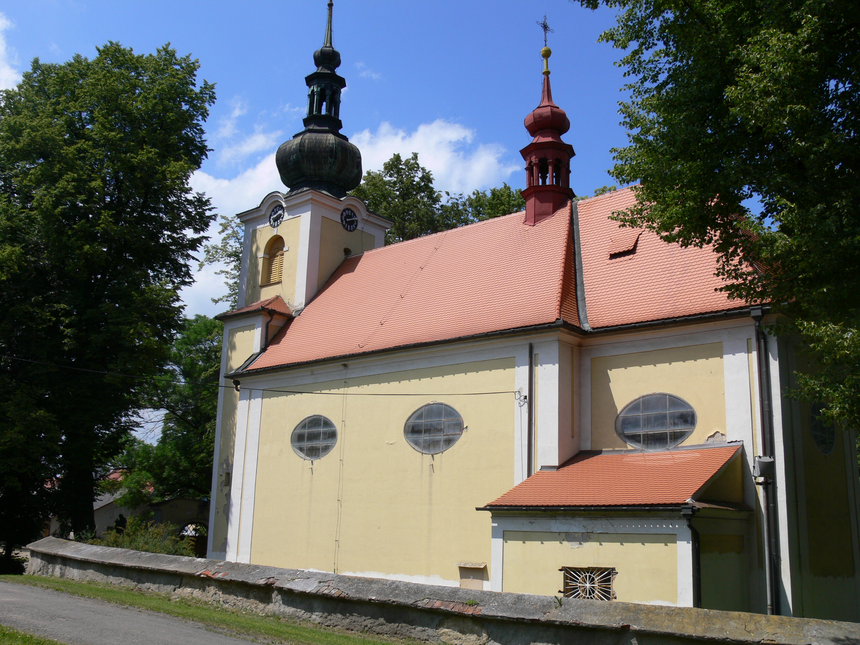 Farní kostel sv. Jiří v Pivíně, nynější stavba ve stylu gotizujícího baroka je dílem Jana Blažeje Santiniho z let 1712 až 1718.